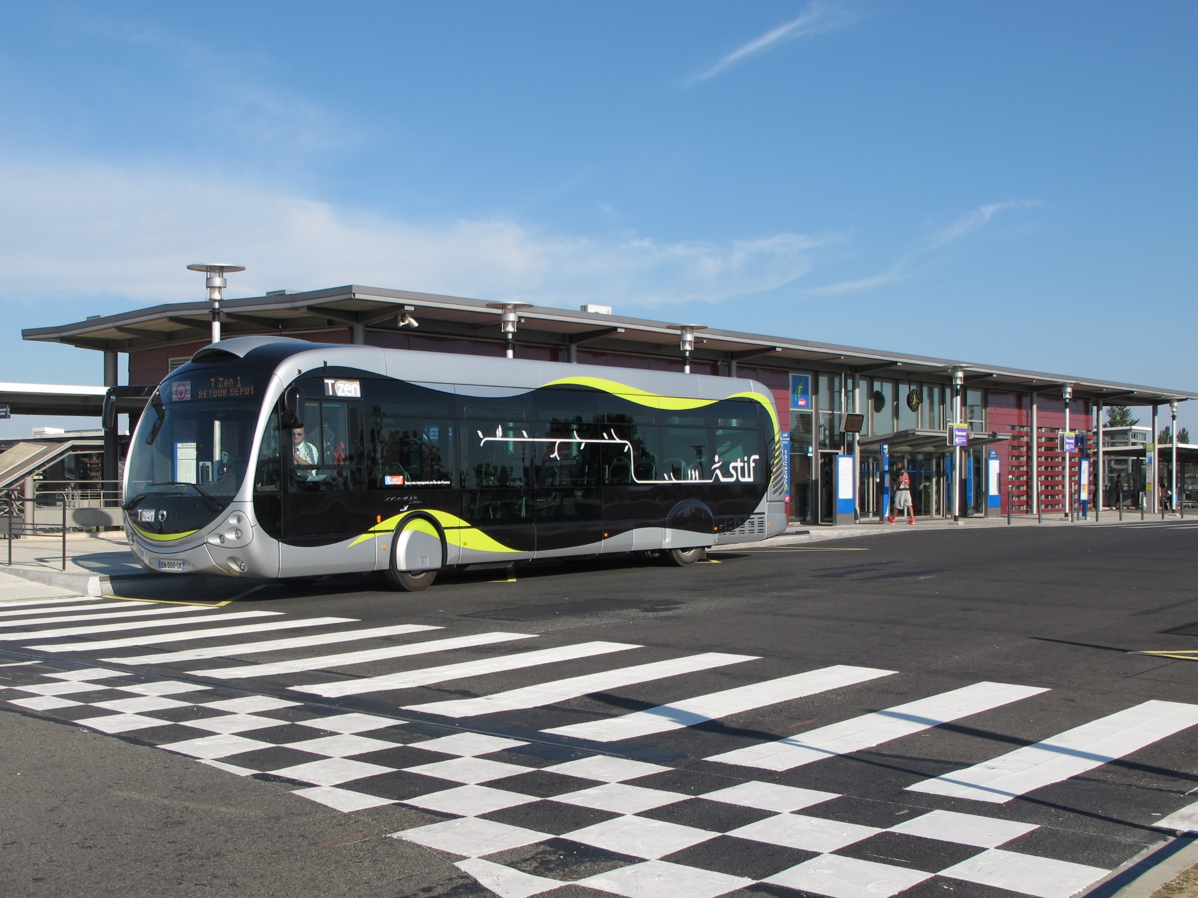 Bus T-ZEN ligne 1 - Gare de Lieusaint (Seine-et-Marne) - Gare de Corbeil-Essonnes (Essonne), France.